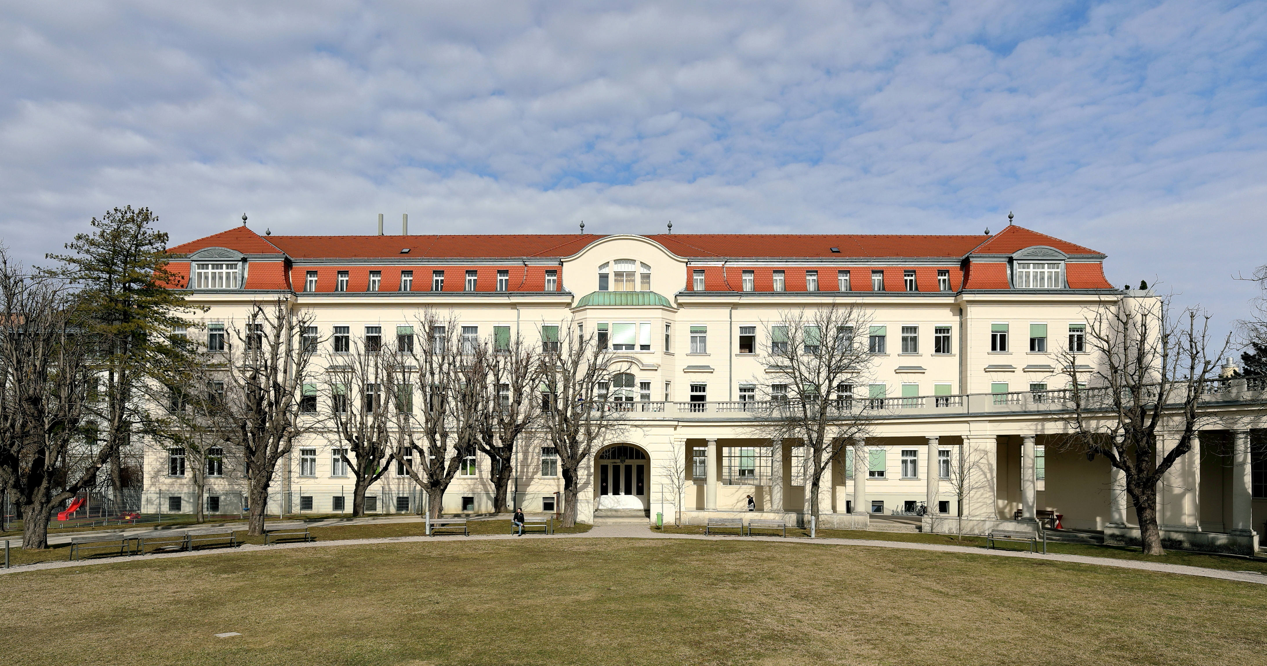 Südwestansicht des Pavillons „Göteborg“ des Orthopädischen Spitals Speising im 13. Wiener Bezirk Hietzing.Das Spital wurde ursprünglich von den Schulbrüdern von 1908 bis 1912 als Waisenhausanstalt errichtete. Während des Krieges war es ein Reservelazarett für Nervenkranke und wurde schwer beschädigt. Danach wurde es zu einem Landeskrankenhaus für Niederösterreich ausgebaut. Dabei wurde als Kinderstation das „Göteborghaus“ errichtet, von Schweden großteils finanziert und am 3. Juni 1949 eröffnet. Das eigentliche Spital siedelte bereits 1956 nach Mödling ab und es zogen die „Steyler Missionsschwestern“ ein, die ein Orthopädisches Spital betrieben. Die Kinderstation „Göteborghaus“ übersiedelte jedoch erst 1969 nach Mödling. Seit 1999 gehört das Spital zur Vinzenz-Gruppe.